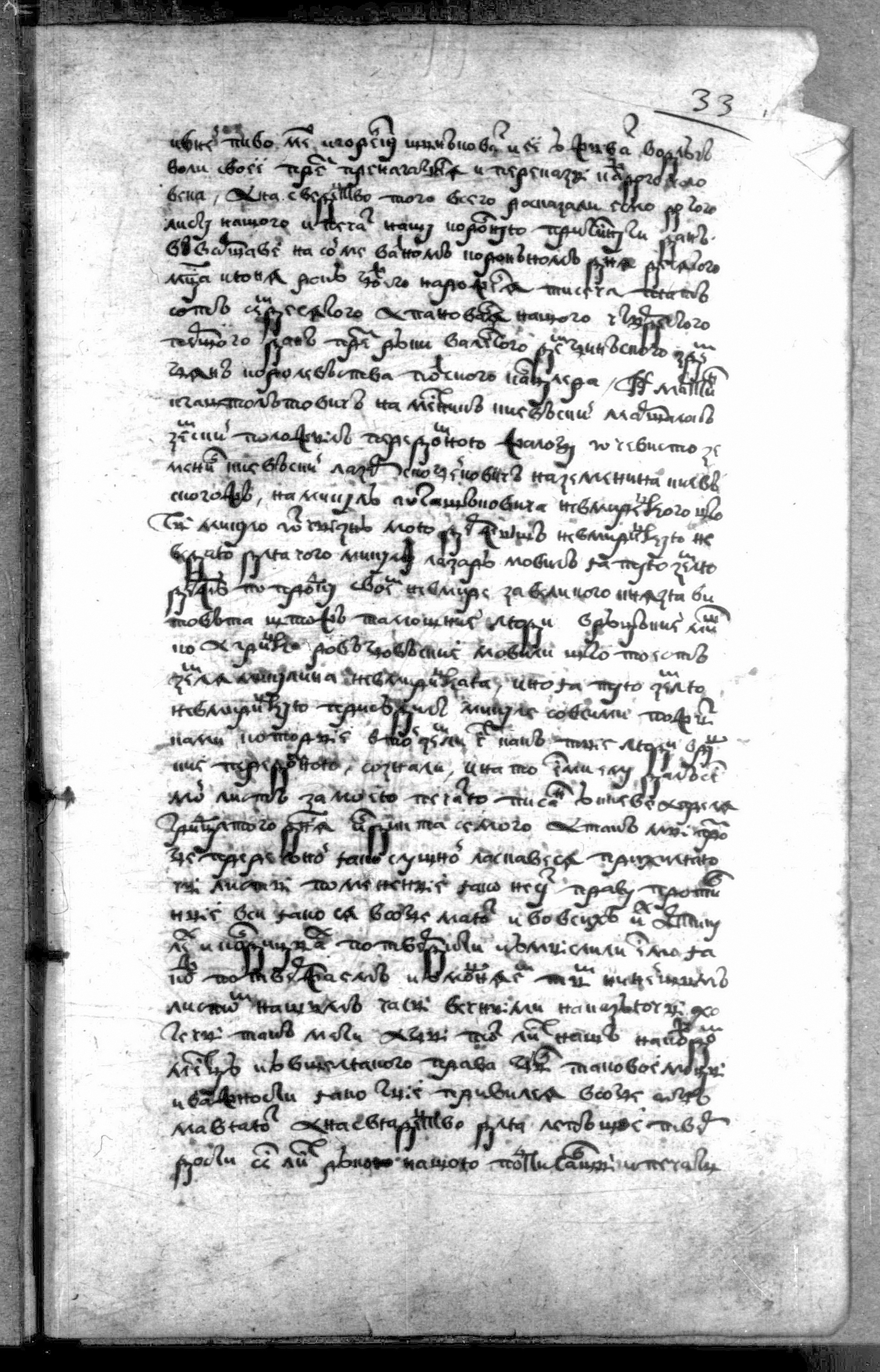 Подтвержденье привилея киевского воеводы Мартина Гаштольда от 30 апреля 1474 года шляхетным Невмирицким польским королем Сигизмундом III.